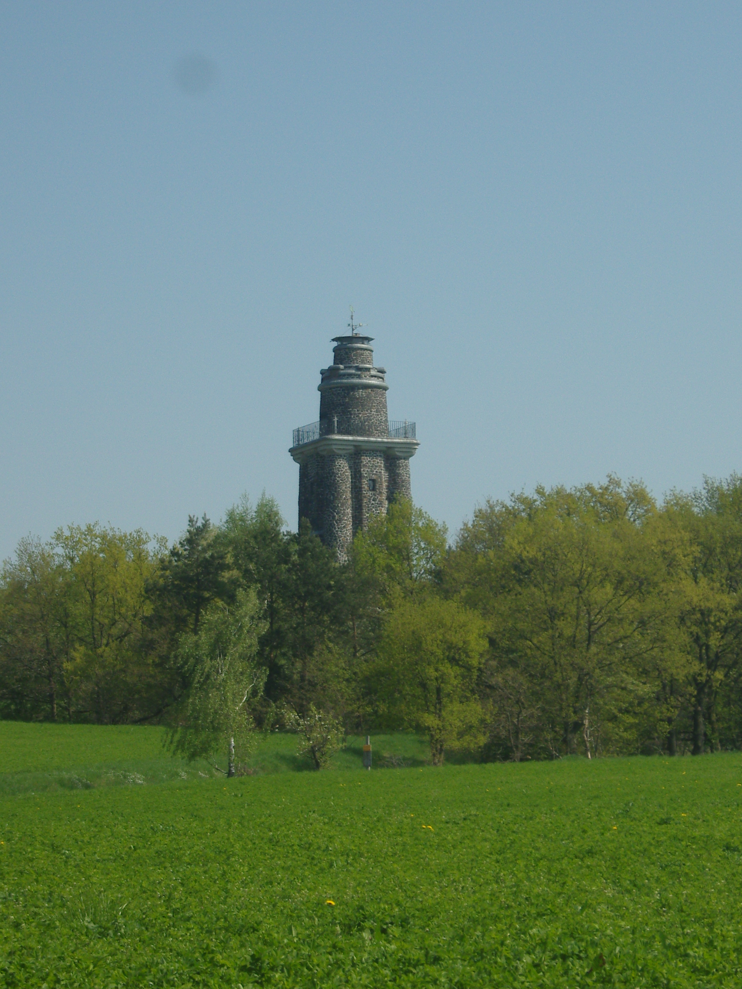 Bismarckturm auf dem Wachtelberg in Dehnitz